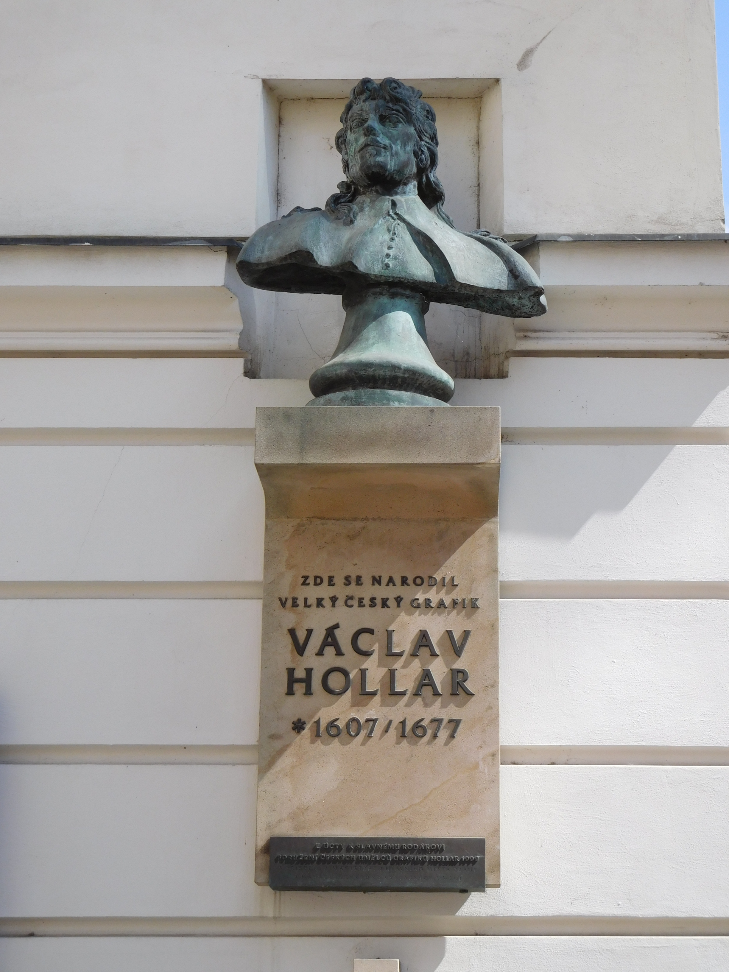 Praha - Nové Město, Soukenická 13, busta V. Hollara